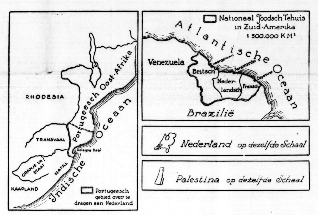 Mussert schrijft over - Een nationaal Joodsch Tehuis aangewezen